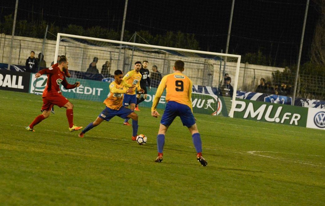 Match Canet FC vs Sud Nivernais Imphy Decize au stade Saint-Michel de Canet-en-Roussillon le 6 janvier 2018.